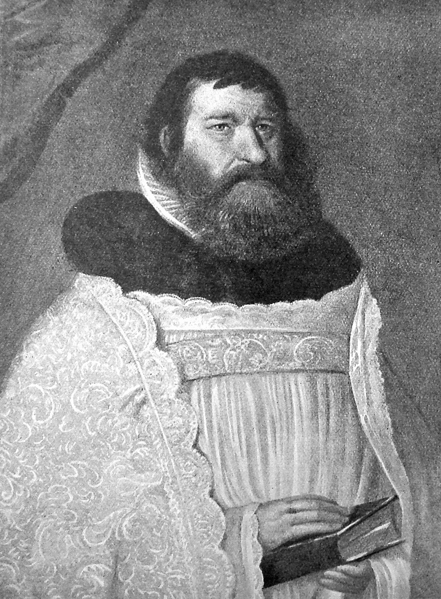 Jesper Rasmussen Brochmand (5. august 1585 - 19. april 1652) var professor ved Københavns Universitet 1610-1638 og biskop over Sjælland fra 1638 til sin død